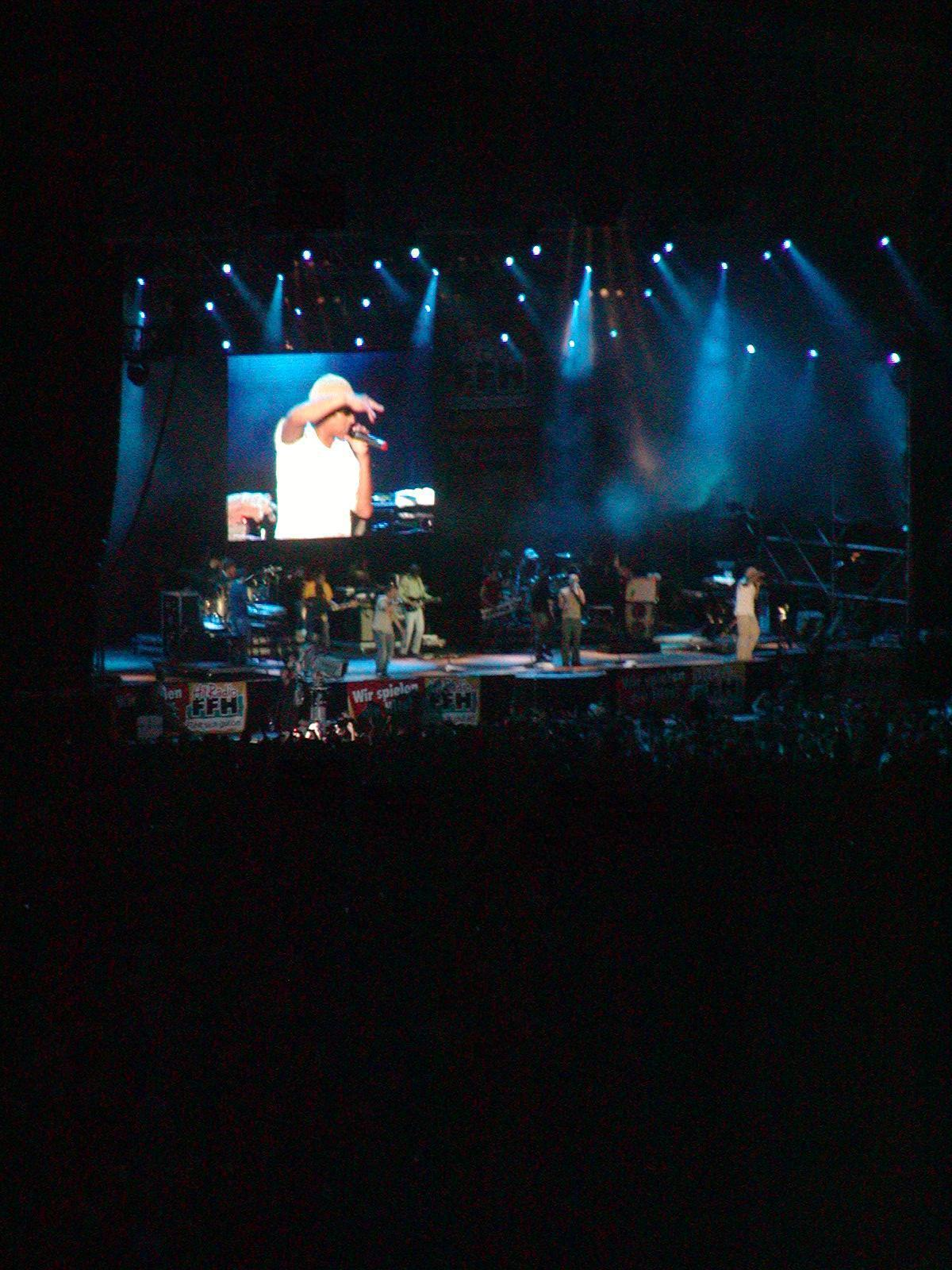 Xavier Naidoo bei einem Konzert im Rahmen des Hessentags 2005 in Weilburg